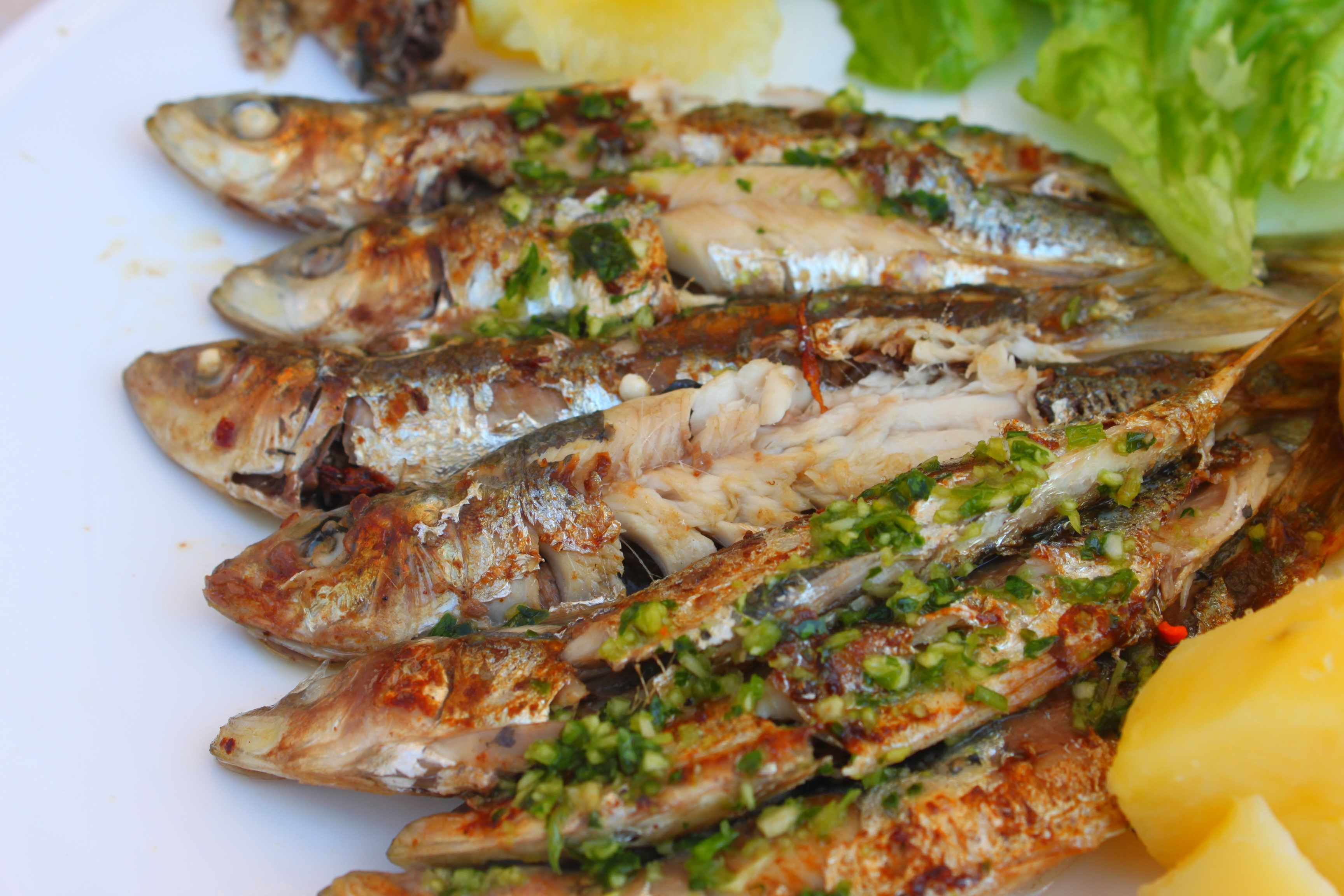 Sardele na žaru - Gegrillte Sardinen